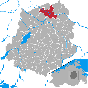 Loitz, Landkreis Demmin, Mecklenburg-Vorpommern